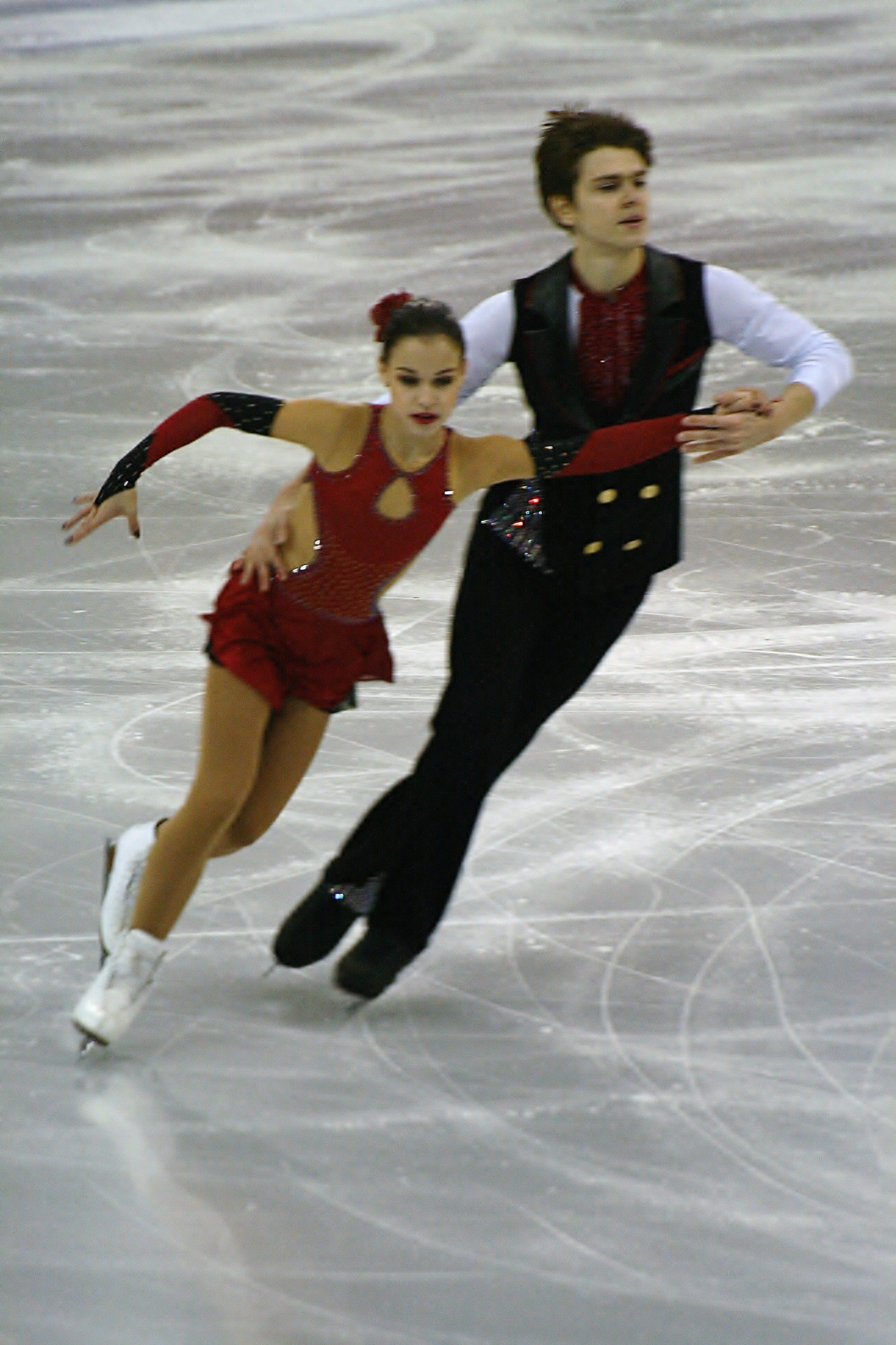 Анастасия Губанова и Алексей Синцов (Россия) на финале Гран-при по фигурному катанию среди юниоров 2015-2016.